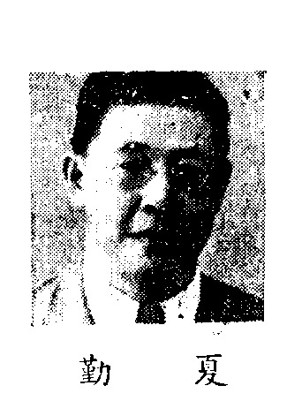 中文（中国大陆）: 制憲國民大會代表